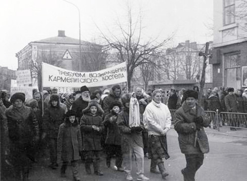 Demonstranci żądają zwrotu klasztoru i kościoła w Berdyczowie (1990 rok). Zdjęcie Jerzego Sokalskiego przekazane do wolnej publikacji na Wikipedii.